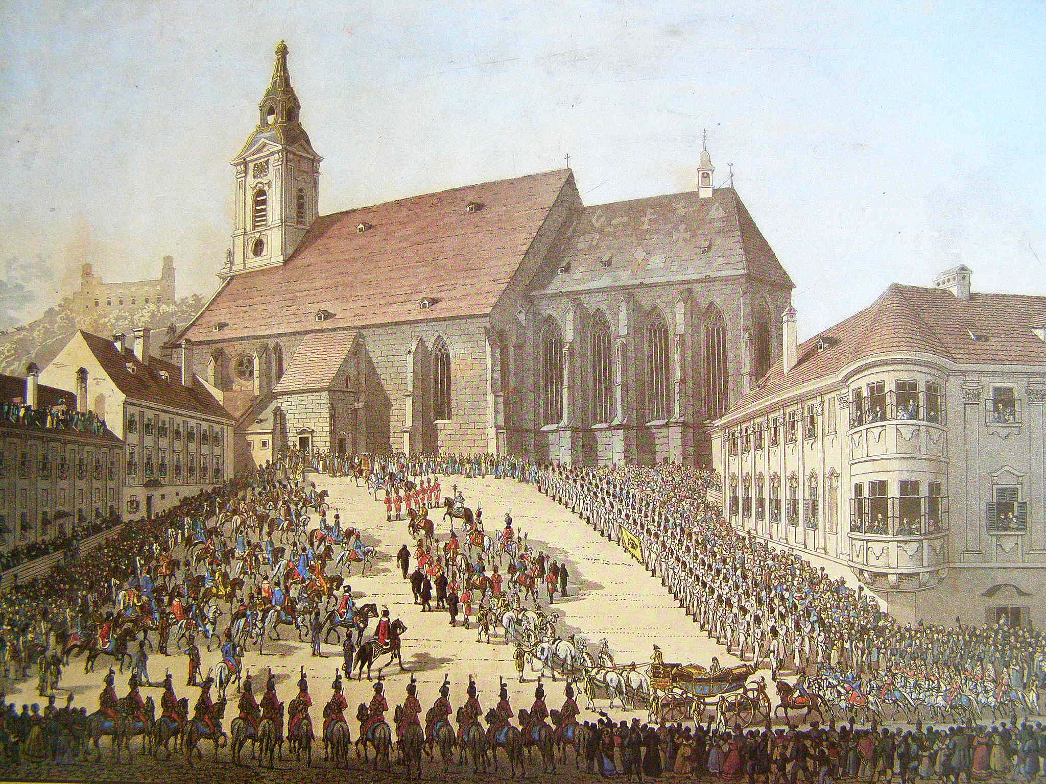 Eduard Gurk, Príchod korunovačného sprievodu Karolíny Augusty do Dómu svätého Martina v Bratislave 25. septembra 1825, 1825, kolorovaná akvatinta, Galéria mesta Bratislavy, Bratislava